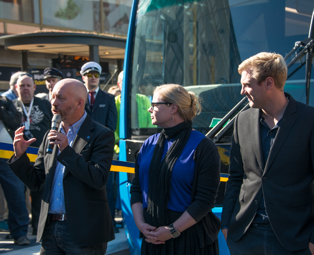 Karl Henriksson (KD), Sara Svanström (L) och Tomas Eriksson (MP) vid invigningen av Spårväg Citys nya hållplats vid Klarabergsgatan och därmed förlängning av linjen fram till T-centralen. Den nya hållplatsen T-Centralen blir ny start- och sluthållplats för Spårväg City mot Djurgården.